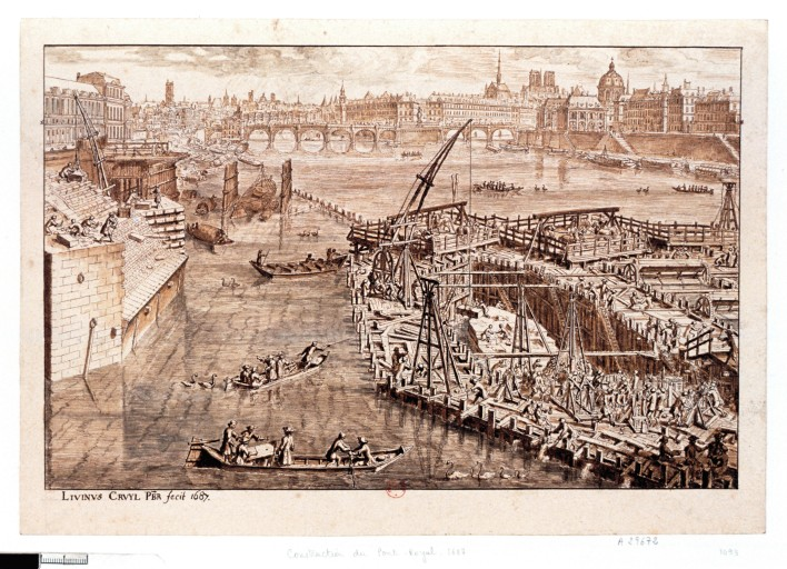 Construction du Pont Royal, à Paris, en 1687.